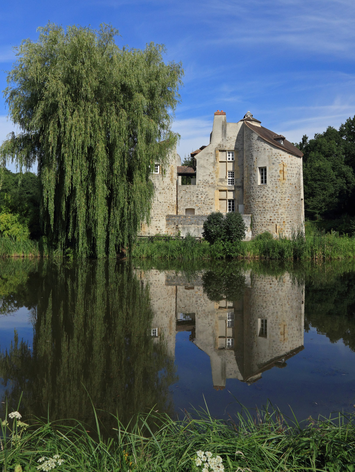 Château de la Chasse en été 2010, dans la forêt de Montmorency (France, Val d'Oise).